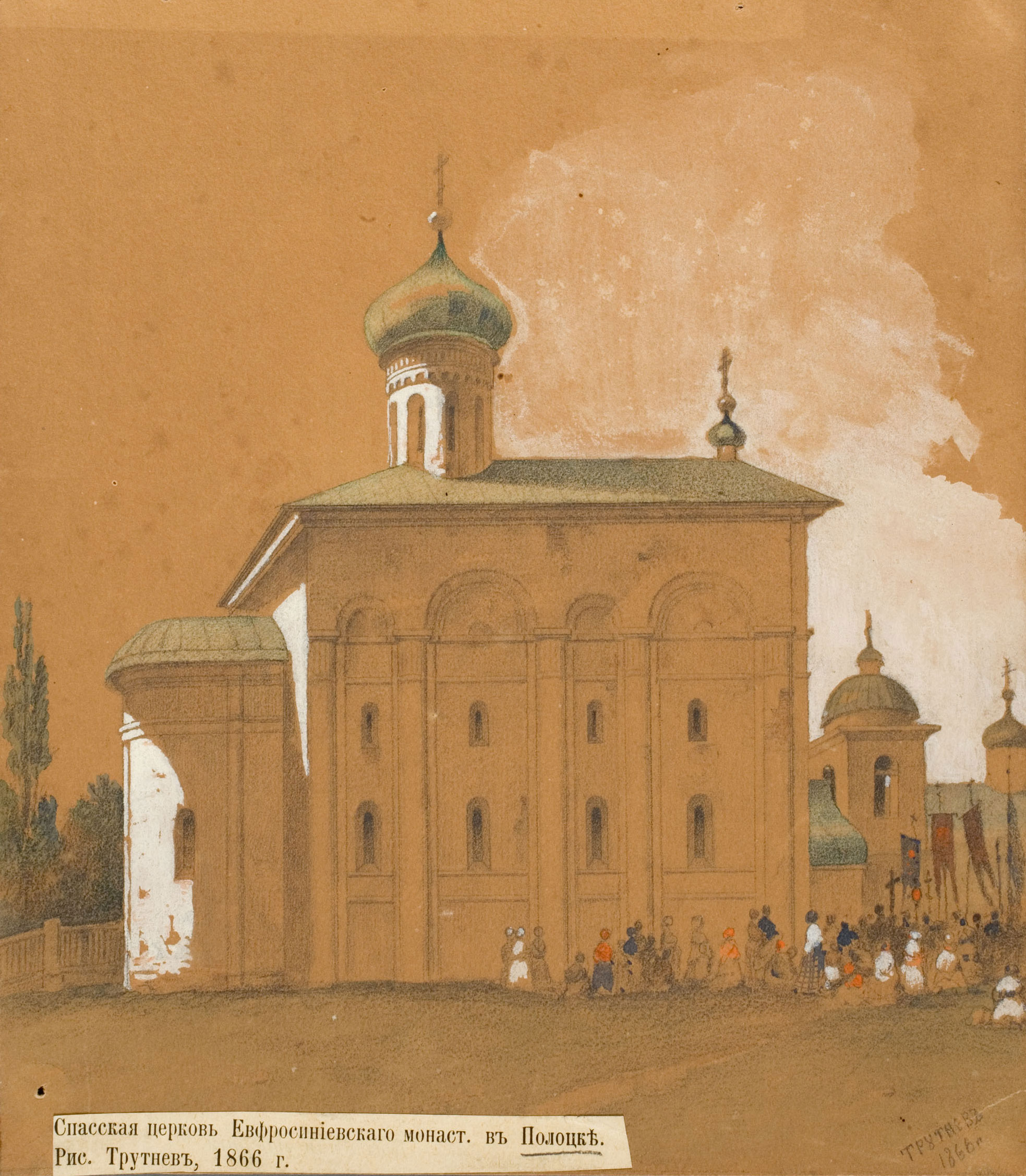 Беларуская (тарашкевіца): Полацак (Połacak), прадмесьце Спас (Spas). Царква Сьвятога Спаса.